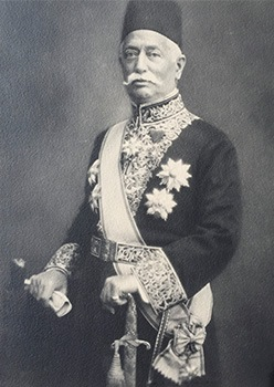 مصرى: يوسف اصلان قطاوى